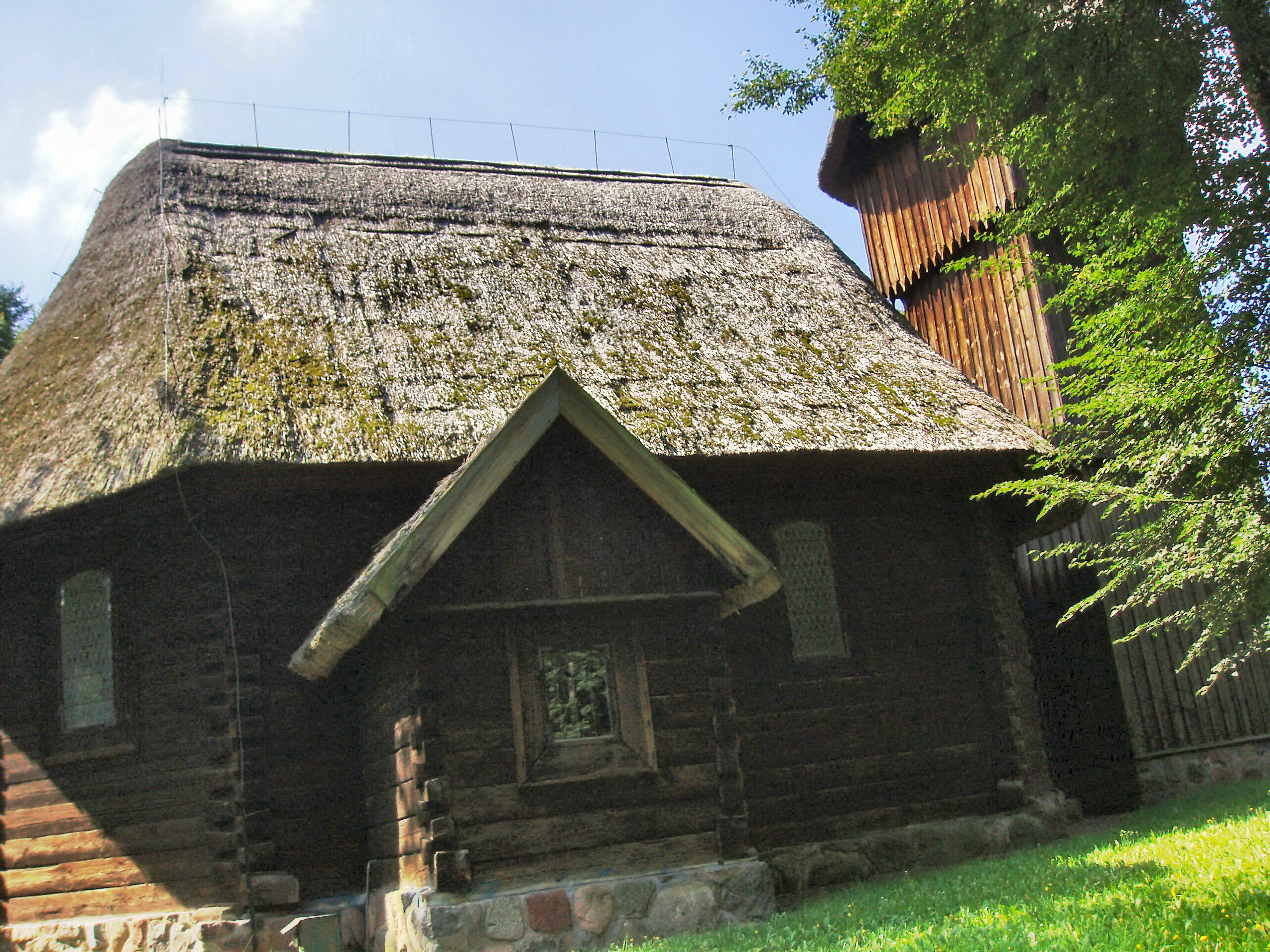 Replika koscioła z Rychnowa w skansenie w Olsztynku